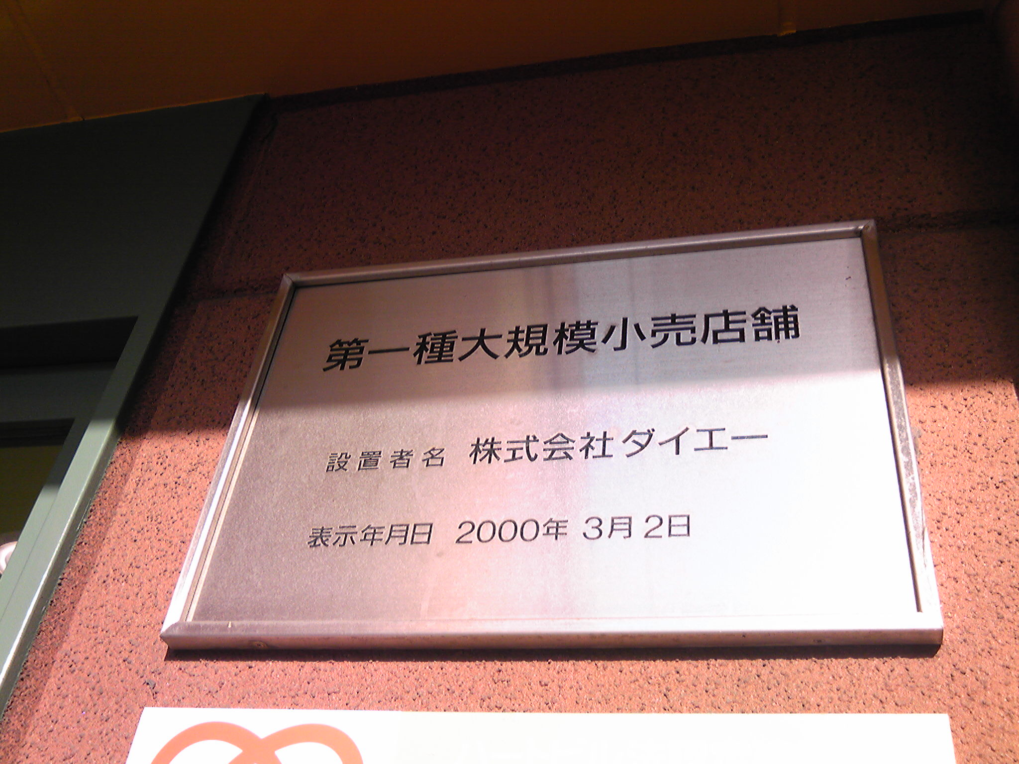 ショッパーズモールマリナタウン（ダイエーマリナタウン店）の第1種大規模小売店舗表示板